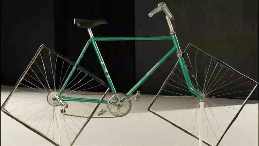 Otis Laubert - Bycikel